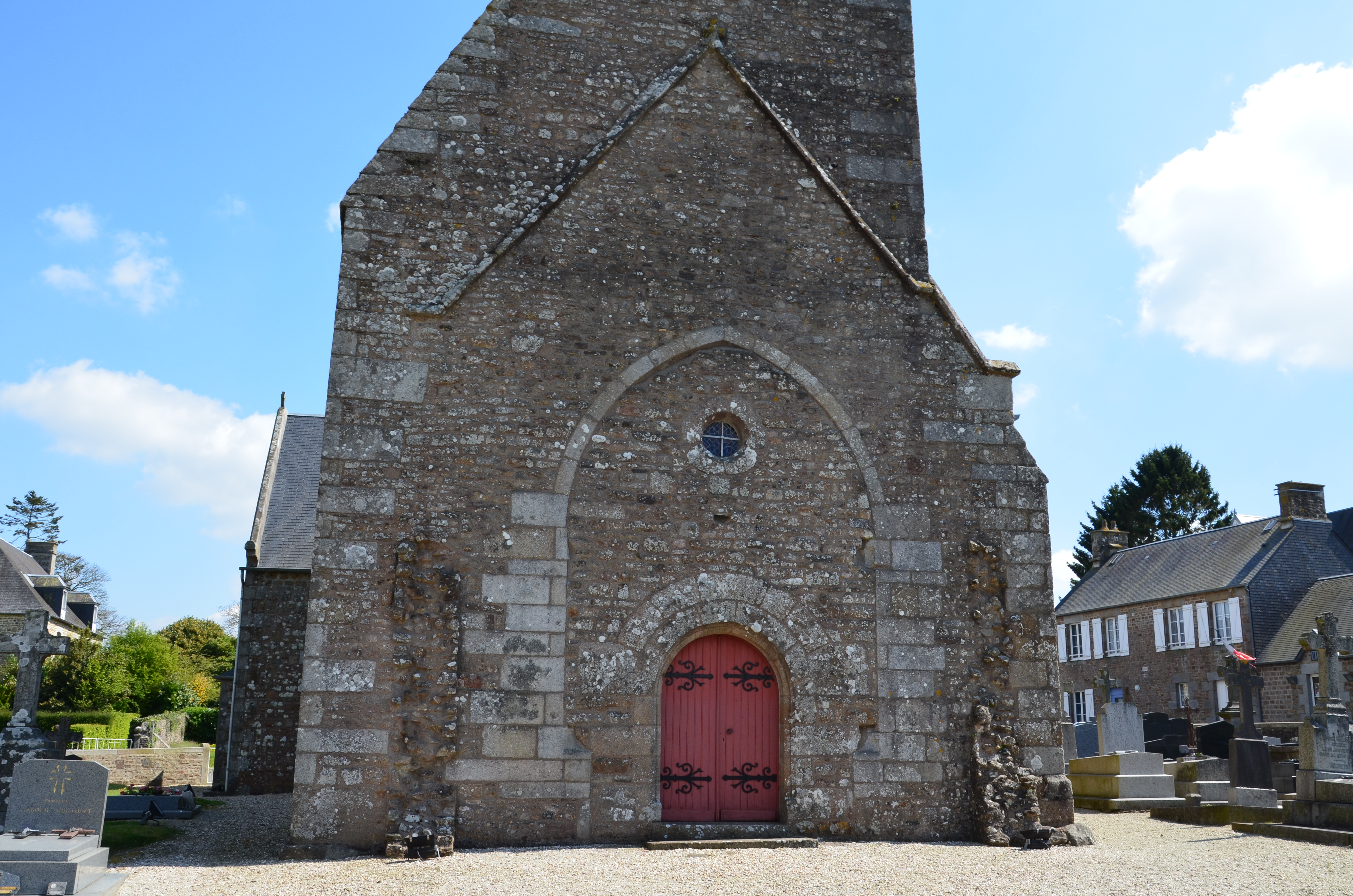 Portique de l'église Saint-Aubin de Saint-Aubin-des-Bois.